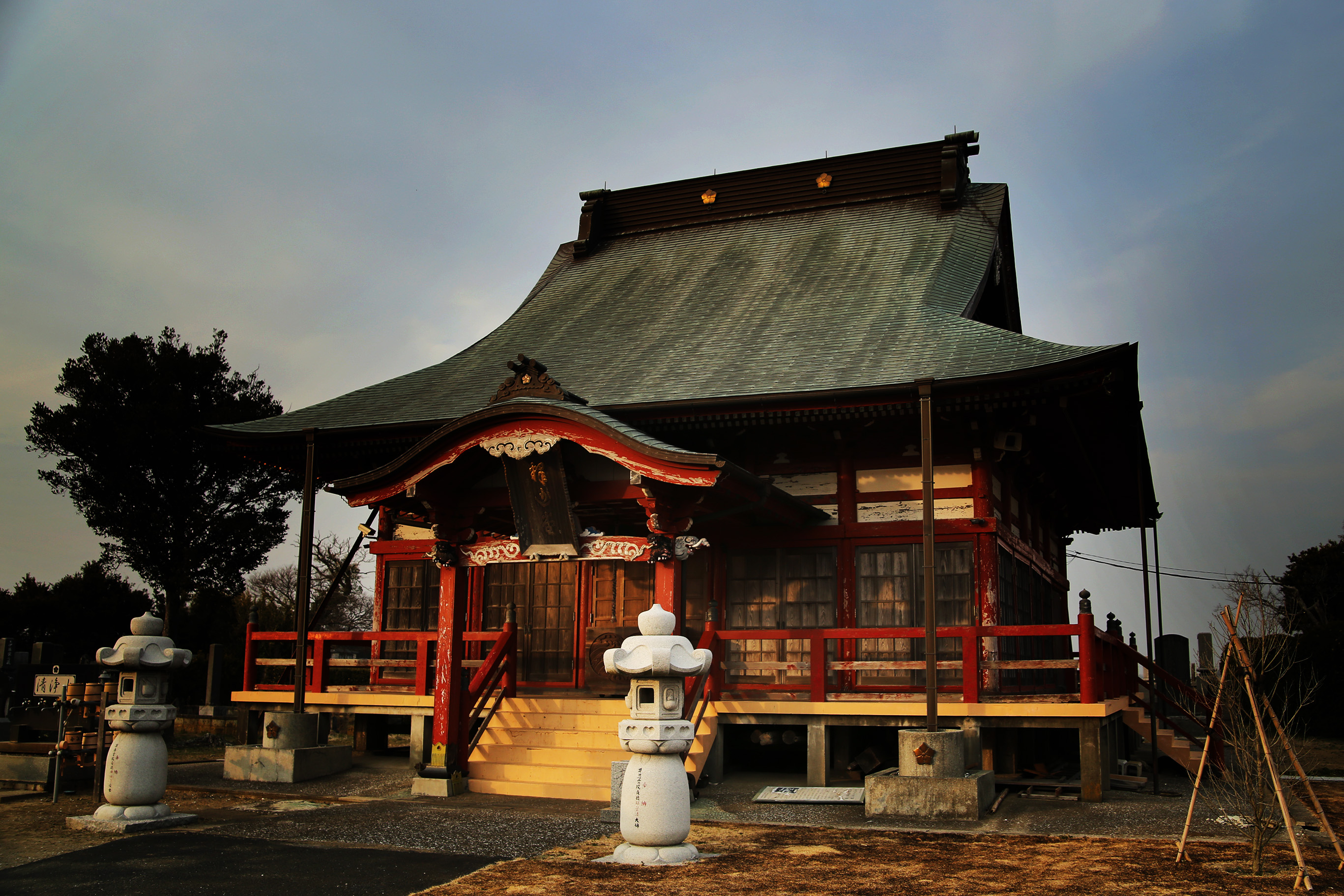 真言宗智山派 勝覚寺の本堂です。